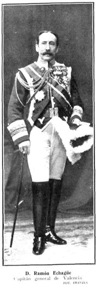 Retrato de Ramón Echagüe, obra del fotógrafo Christian Franzen, recogido en la revista española Mundo gráfico.